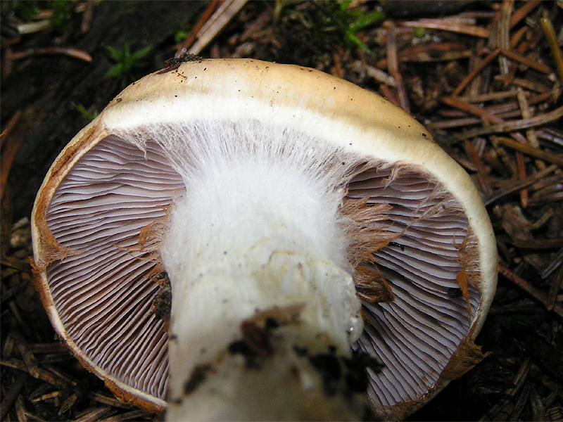 Cortinarius varius - Cortinariaceae